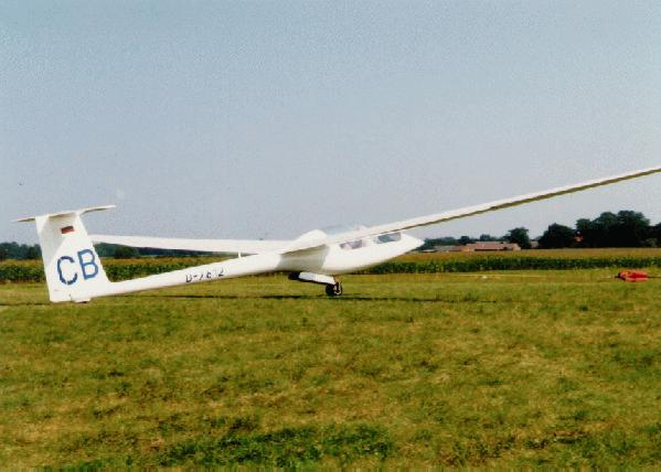 B-12 der Akaflieg Berlin